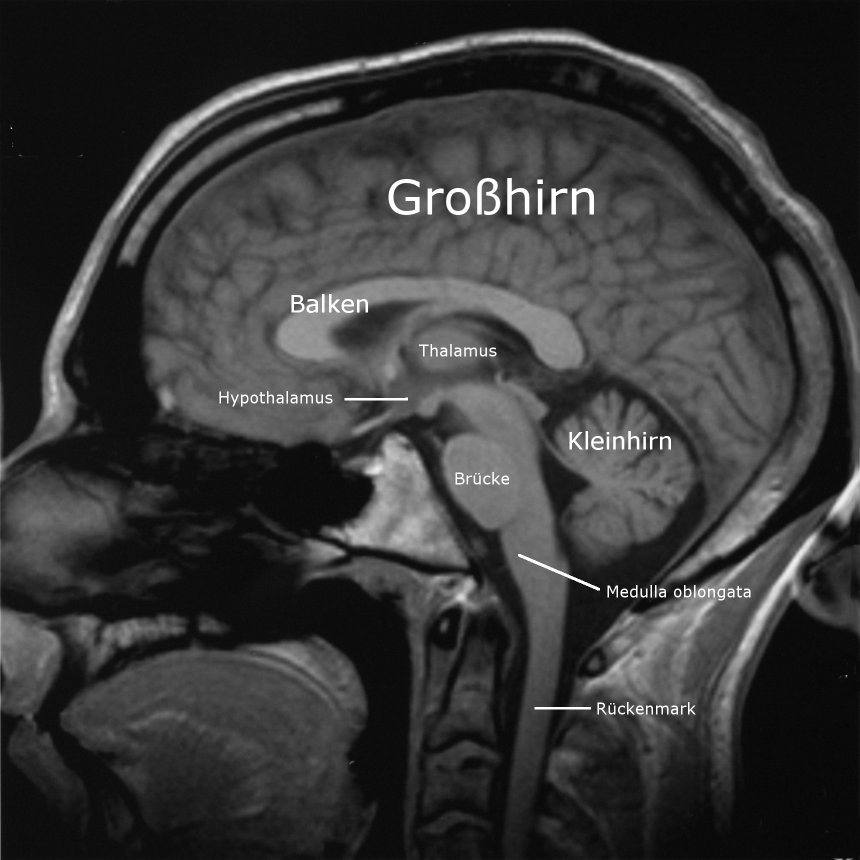 Beschreibung: MRT-Bild eines menschlichen Gehirns. Schnitt sagittal, die Nase ist links. Datum: 13.10.2000 Quelle: Mein höchsteigenes Gehirn. Aufgenommen im Mara, Bielefeld. Author: Christian R. Linder Animierte Abfolge von Schnitten: 300x300 Punkte (800 KB), 600x600 Punkte (2,6 MB) Unbeschriftete Version